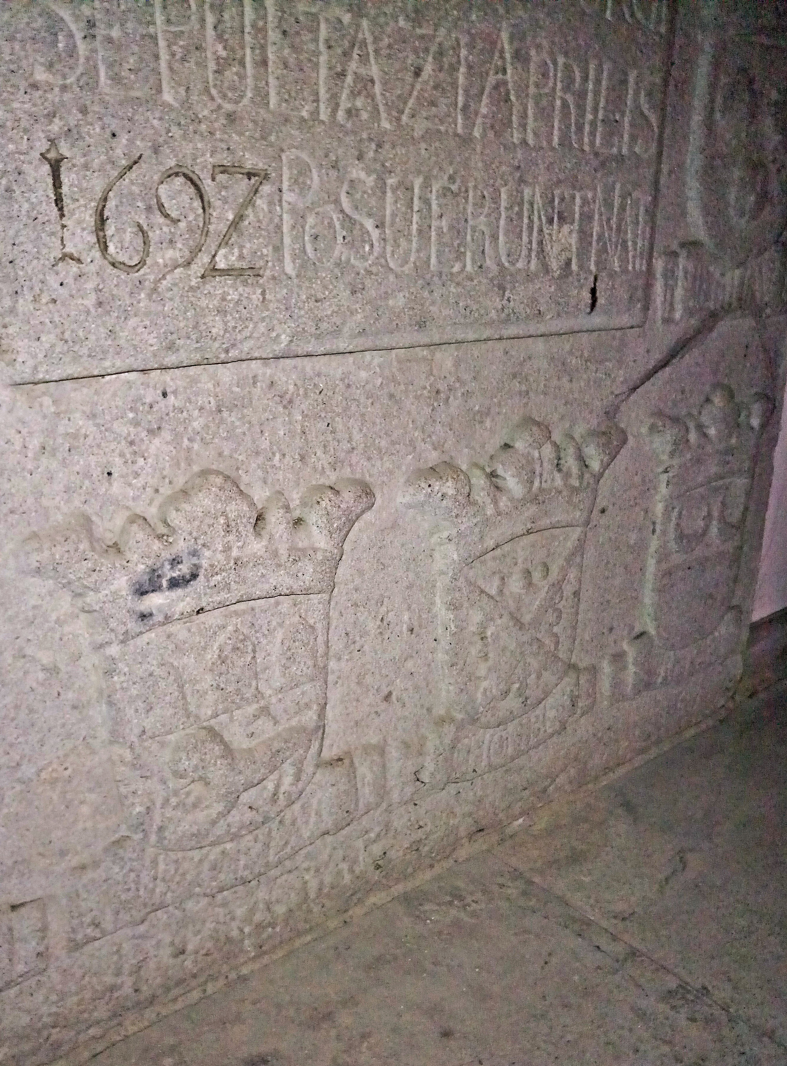 Wappen der "Nagel von Dirmstein" (links) auf der Grabplatte der Emilia Rosina von Auwach geb. von Koppenstein (+ 1692), Krypta Abteikirche St. Michael, Siegburg